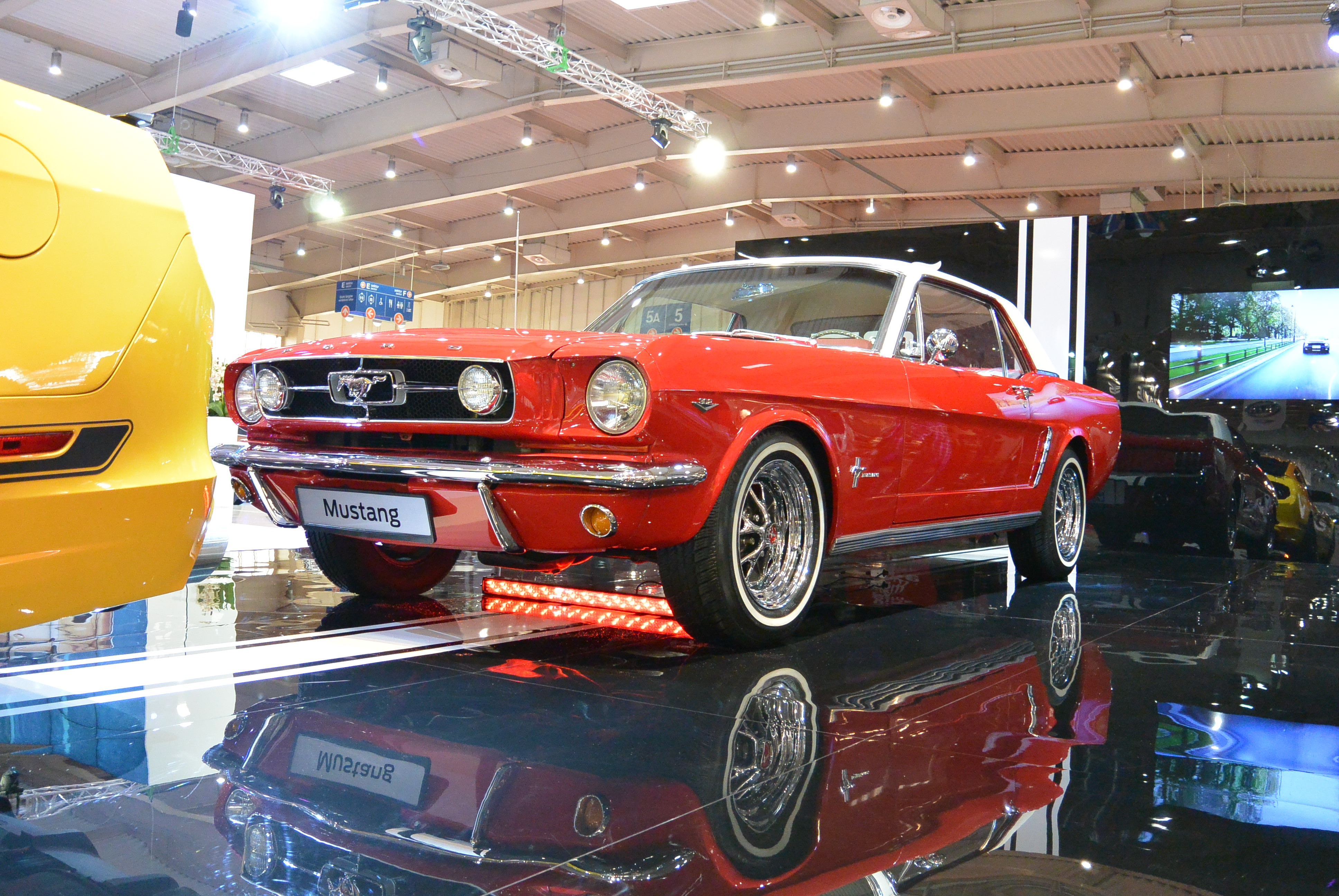 Ford Mustang I podczas Motor Show Poznań 2014.